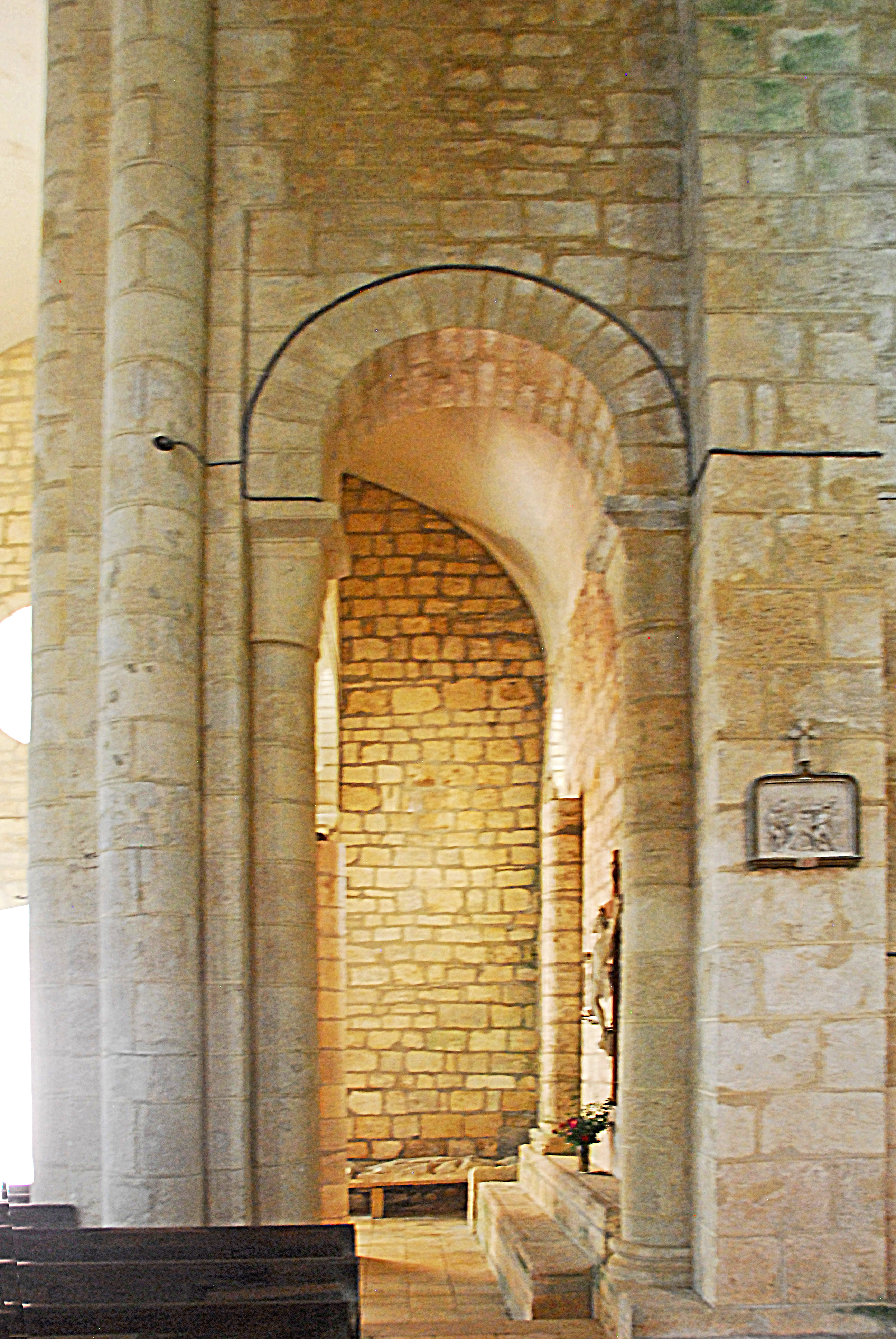 Ste-Croix de Veauce, nördl. Seitenschiff aus Querhaus